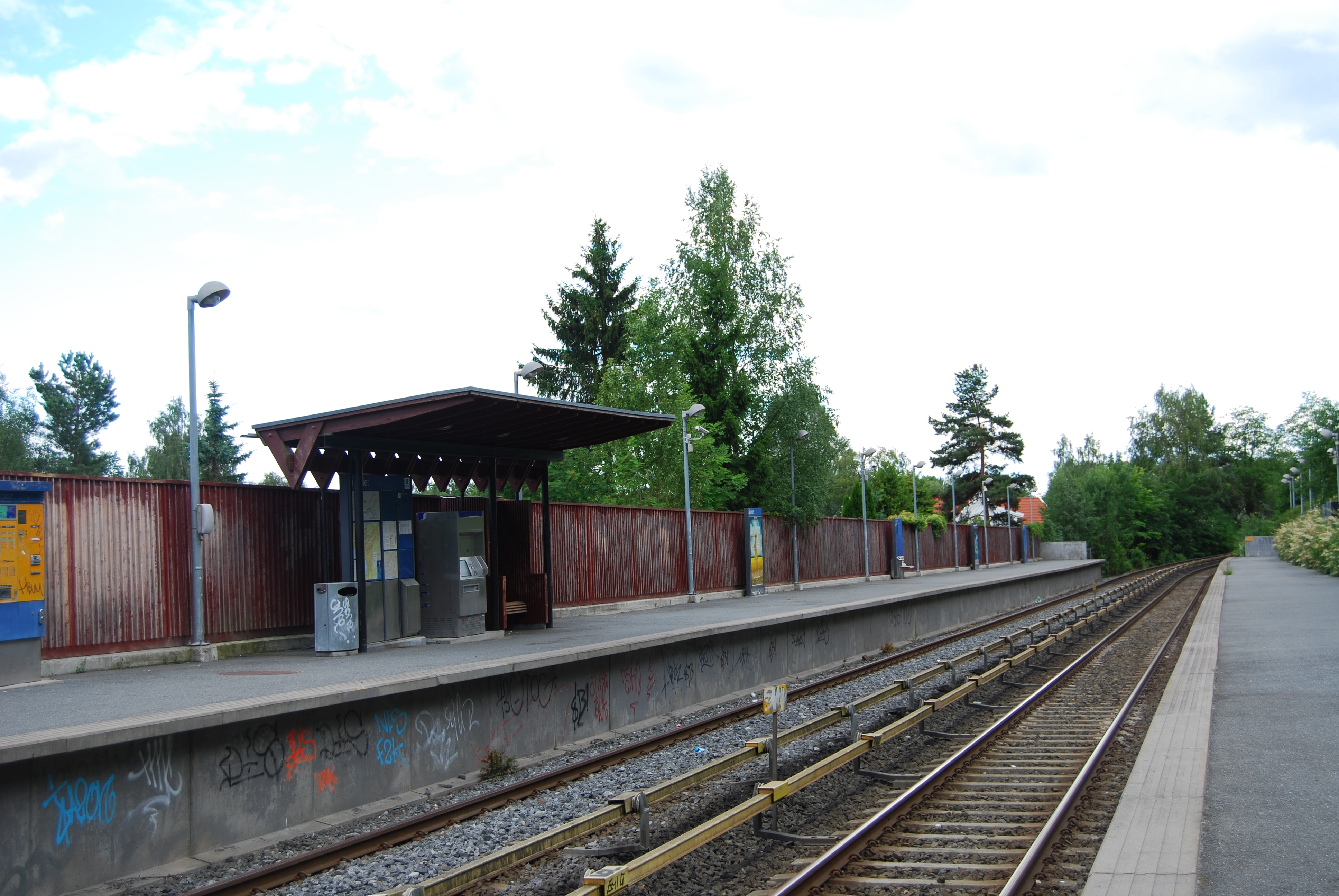 Lijordet stasjon (Oslo) 2009